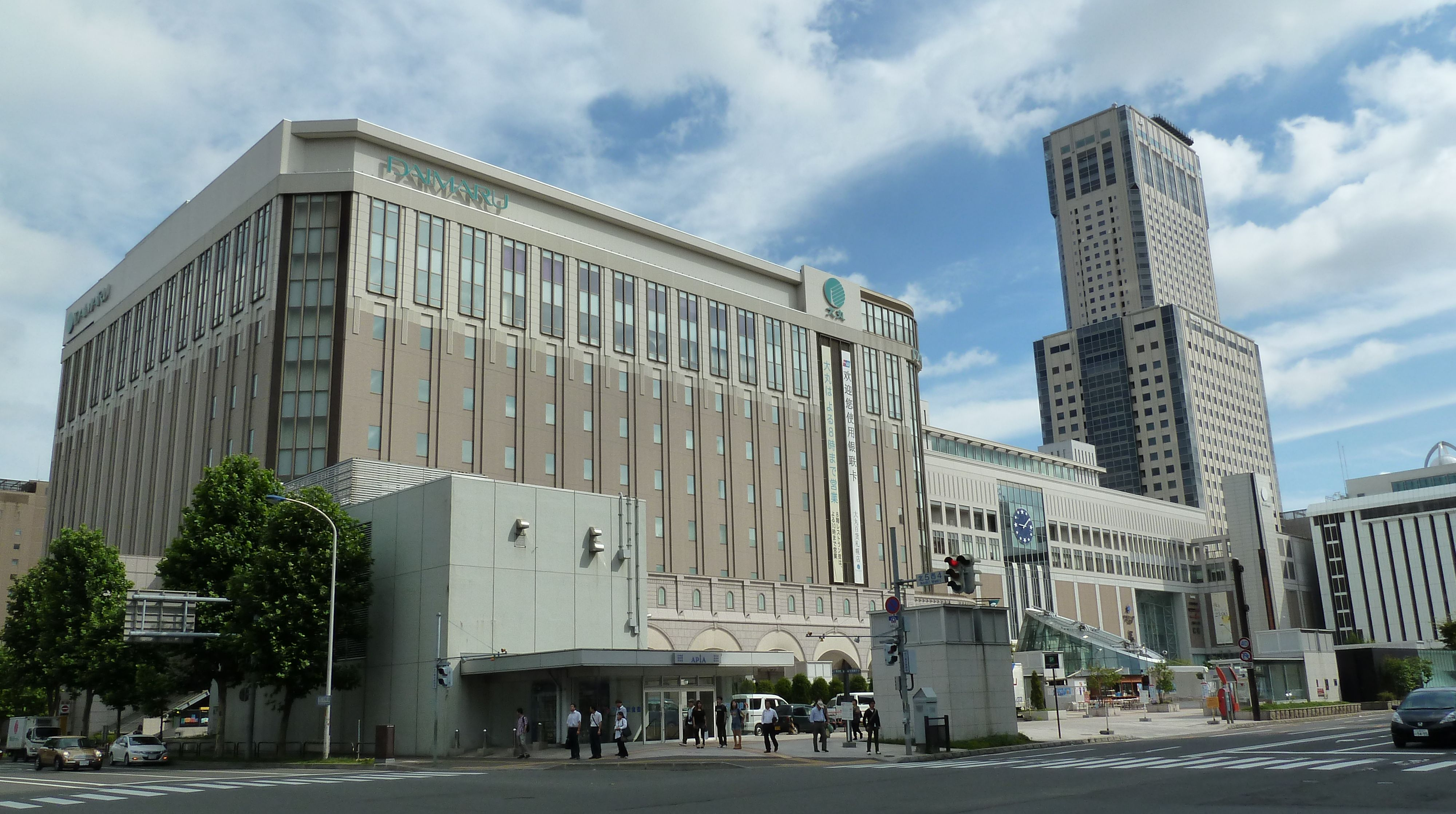 札幌駅舎と大丸